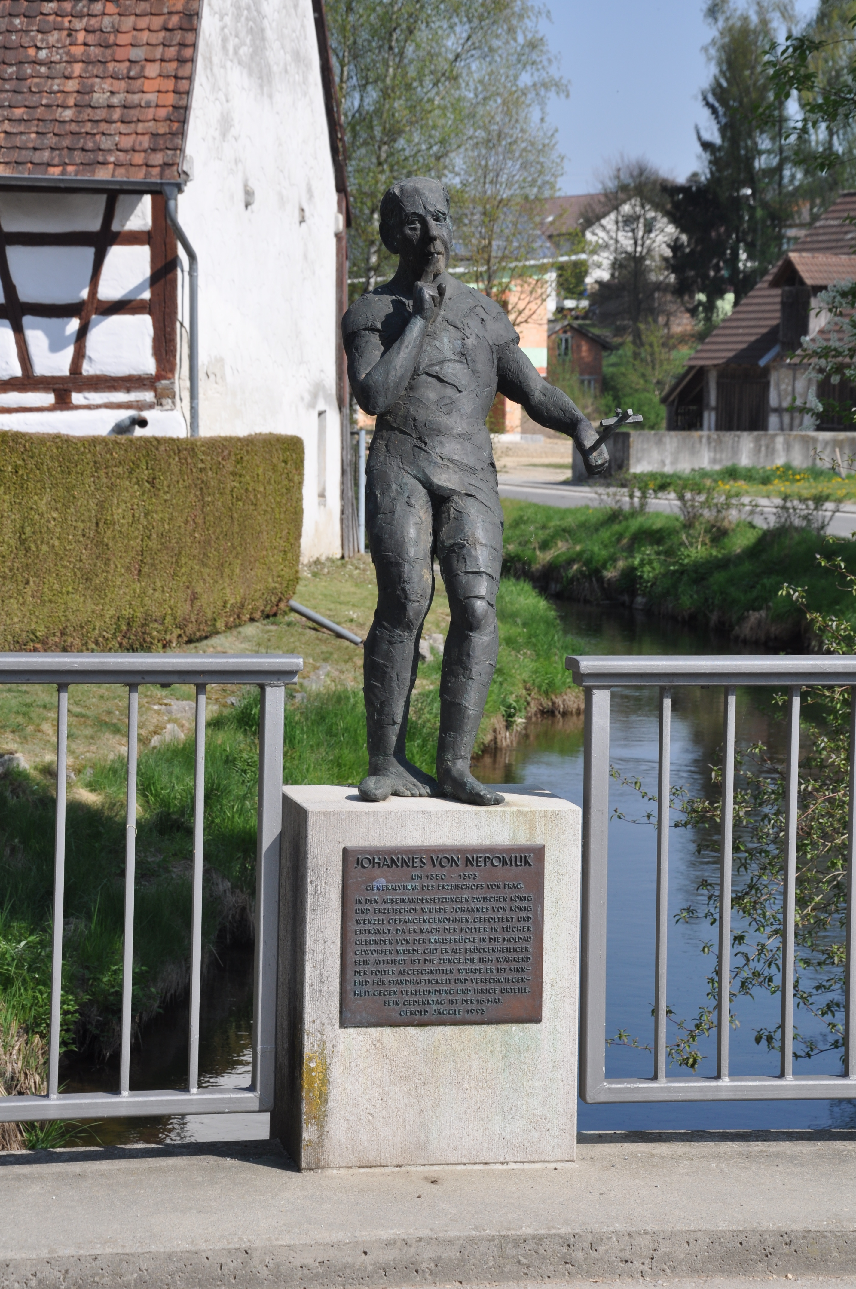 Dürmentingen, Brückenheiliger Johannes von Nepomuk, von Gerold Jäggle, 1993